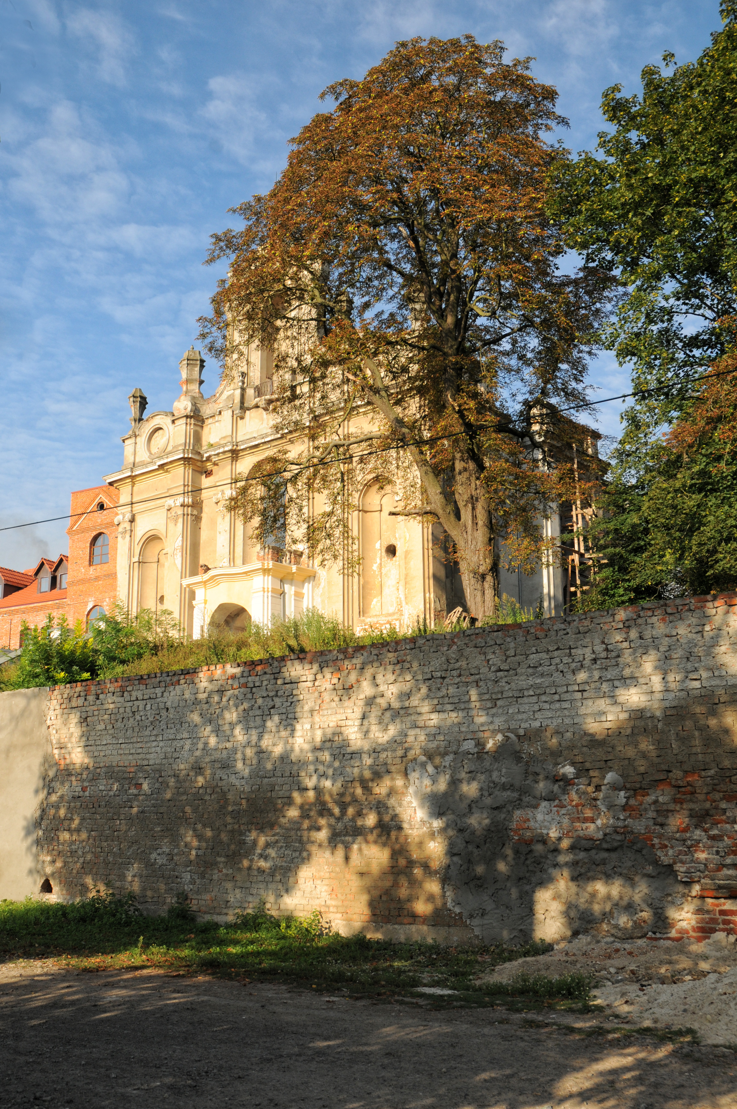 Більшівці, кляштор кармелітів